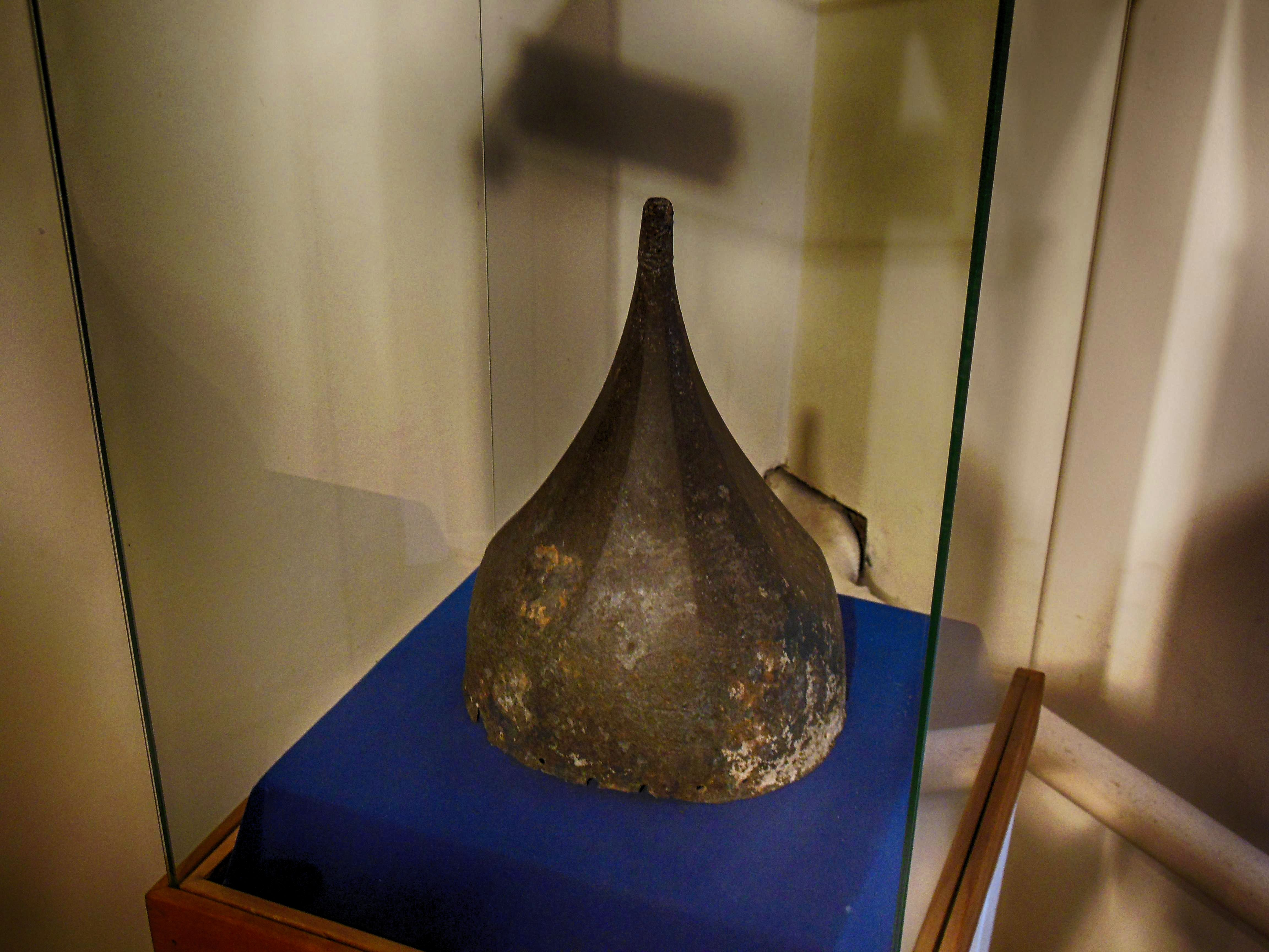 Беларуская (тарашкевіца): Мсьціслаўскі гісторыка-архэалёгічны музэй, старажытнарускі шлем (канец 14 - пачатак 15 стст.)